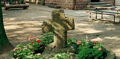 Das Lambertskreuz im Pfälzerwald